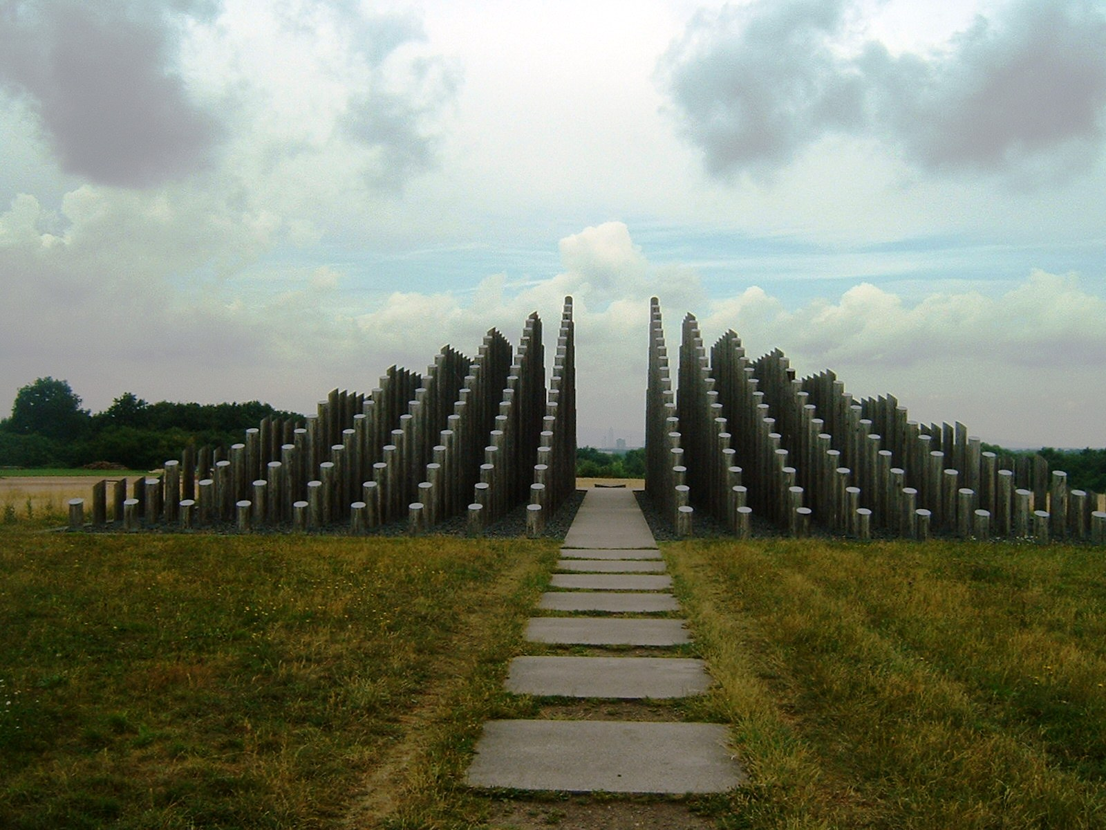 Stangenpyramide, Dreieich; 450 Rundhölzer mit 24 cm Durchmesser. Standort:Auf der Hub, Dreieich-Götzenhain, Blick nach Frankfurt und zum Taunus. Entwurf:Landschaftsarchitekten Ipach und Dreisbusch